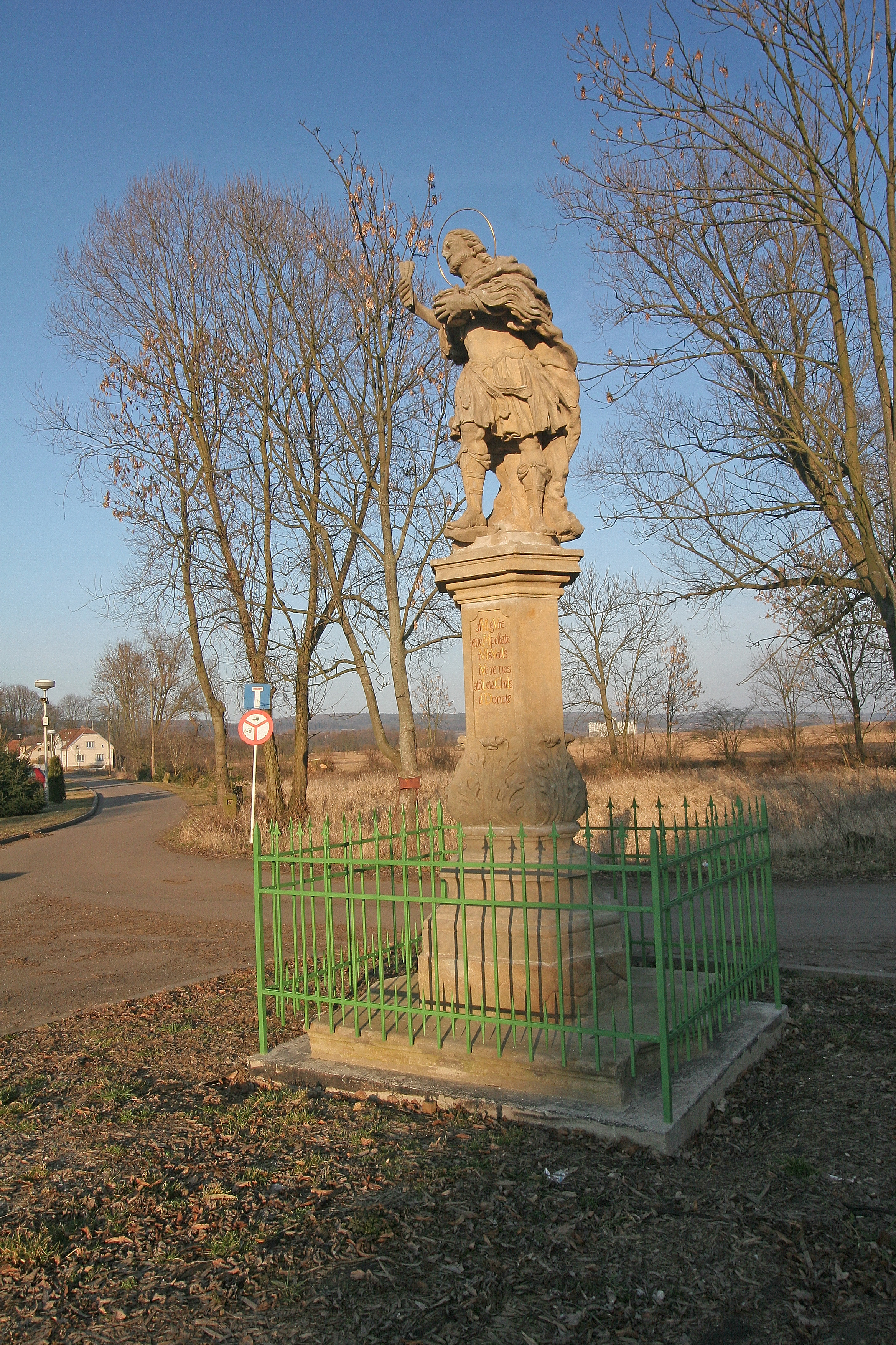 Socha sv. Jana Nepomuckého (Obora), proti čp. 29, při silnici na Ohnišťany, Obora